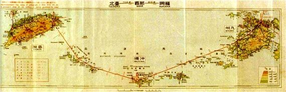 中文（台灣）: 臺北飛行場於 1936 年 3 月 30 日正式開幕。並於同年 4 月 1 日起，由日本航空輸送株式會社經營臺北-福岡定期航班。